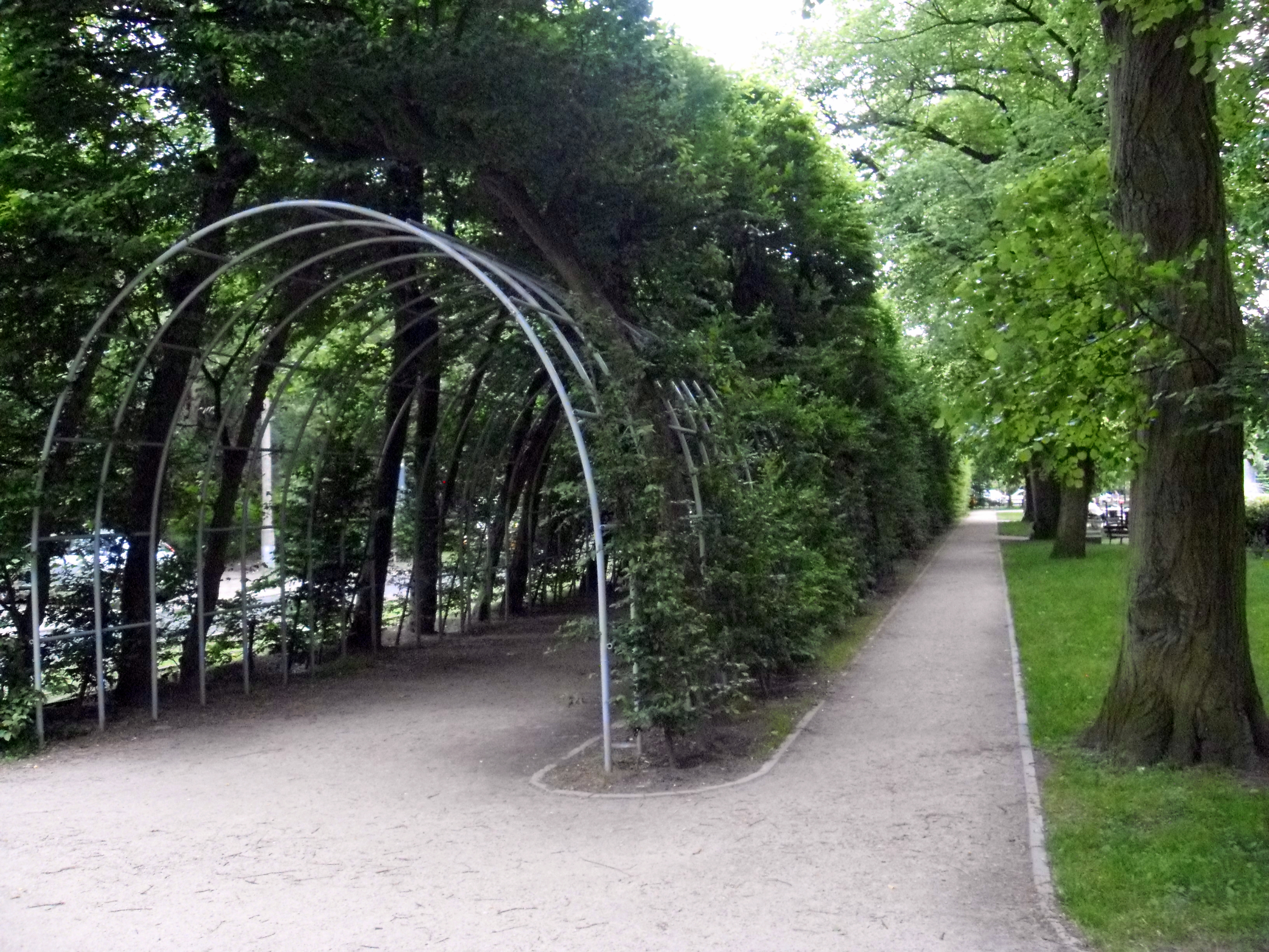 Bindaż w Kołobrzegu.